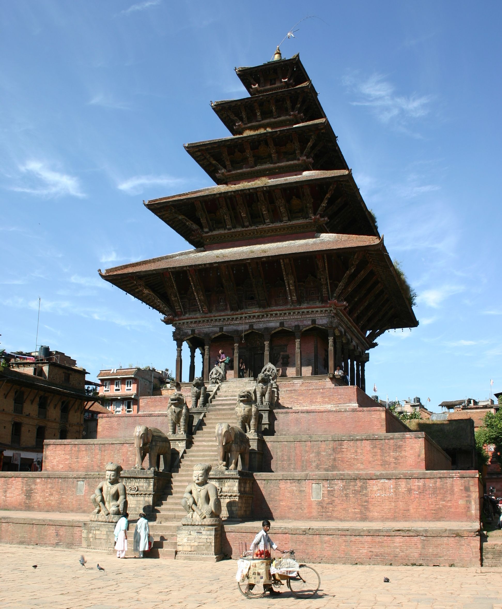 Nyatapole temple in Bhaktapur (Nepal)